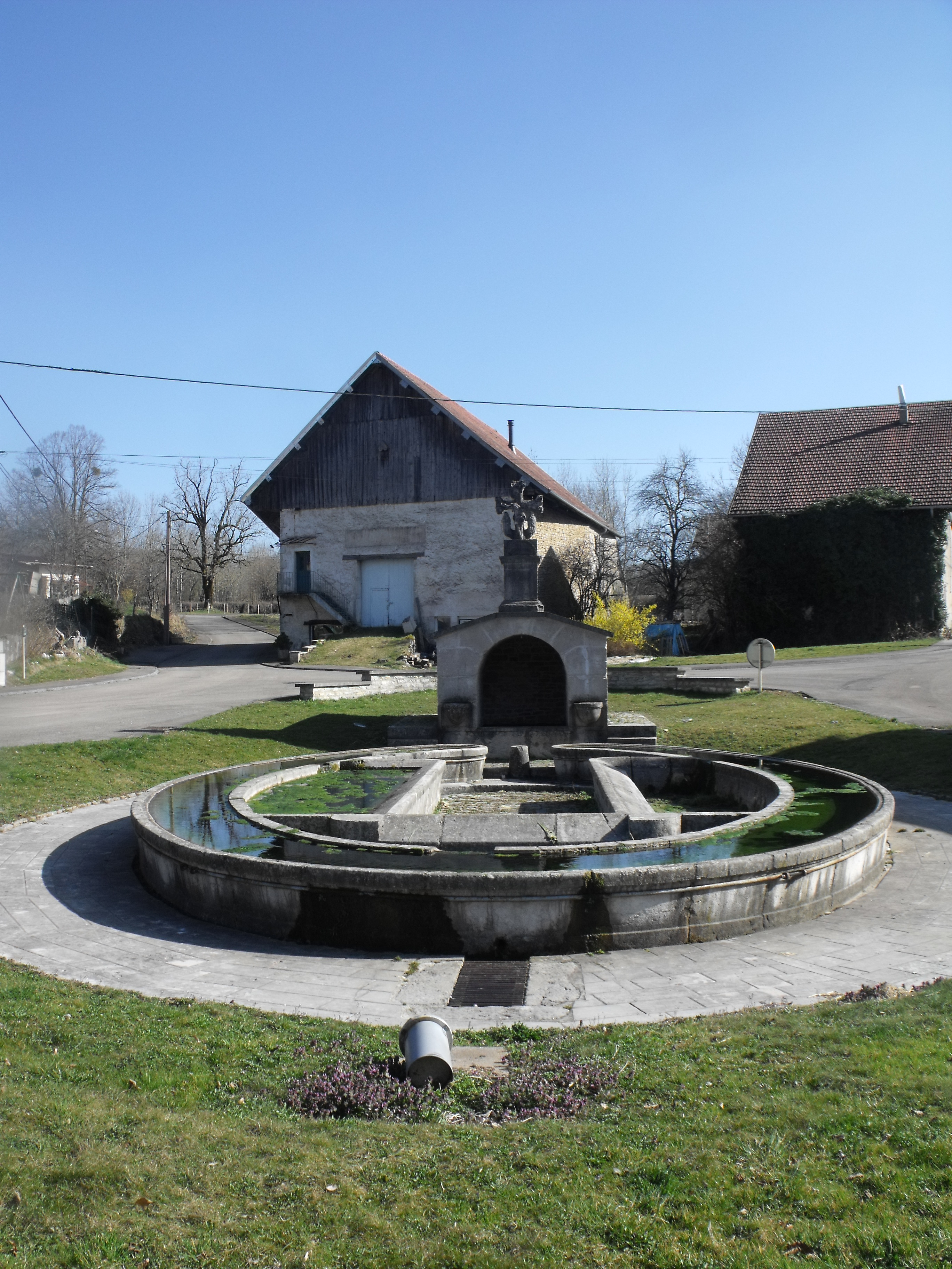 Croix de Germefontaine, Doubs, France